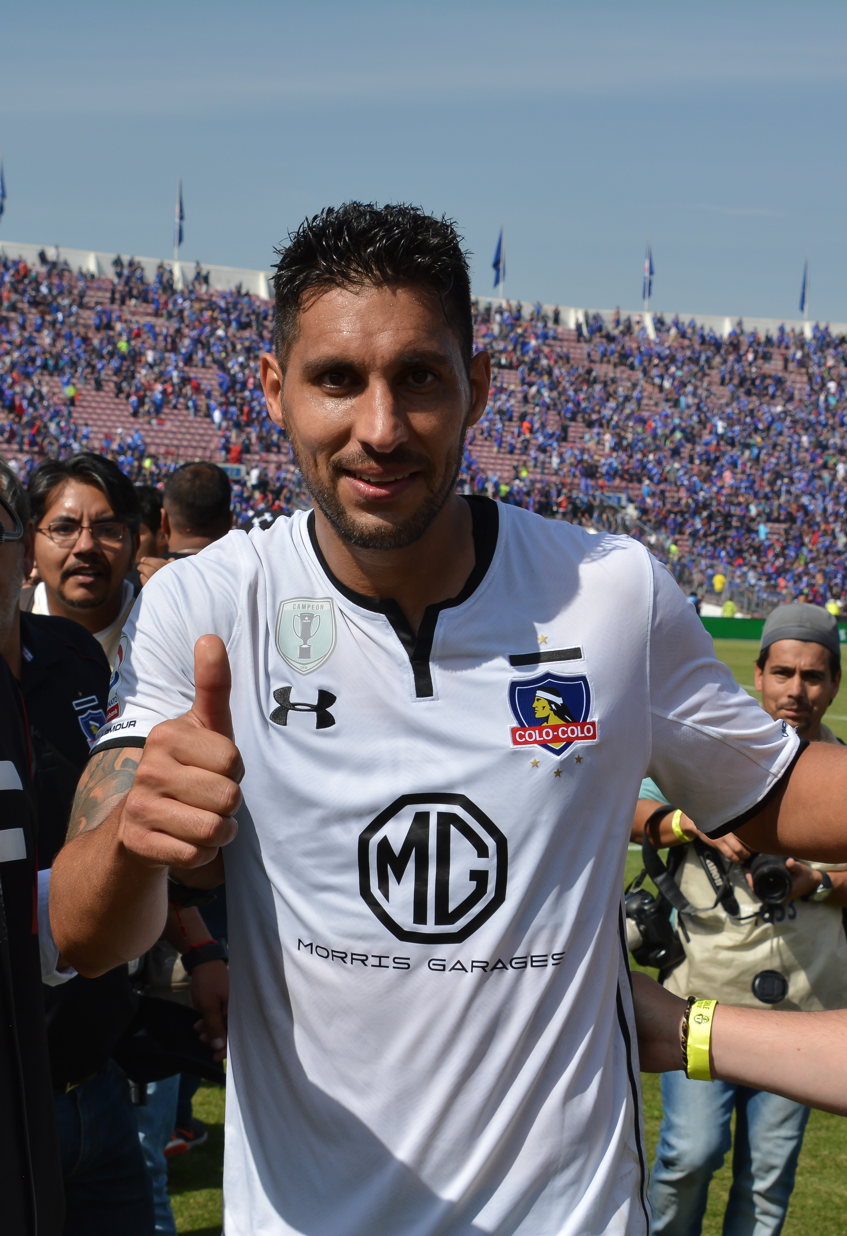 Universidad de Chile v Colo-Colo, Estadio Nacional, Santiago, Chile.